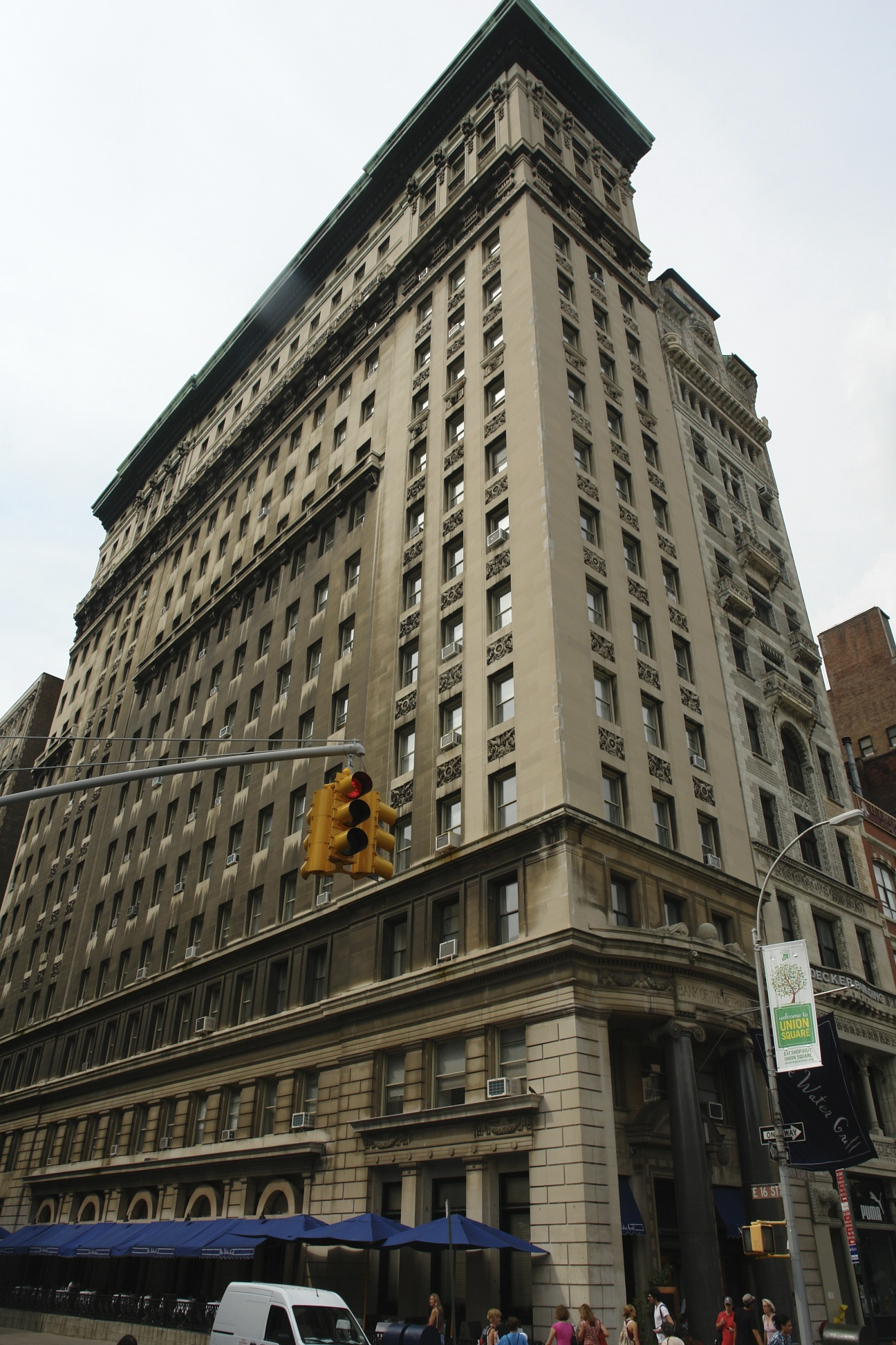 Bank of Metropolis Building